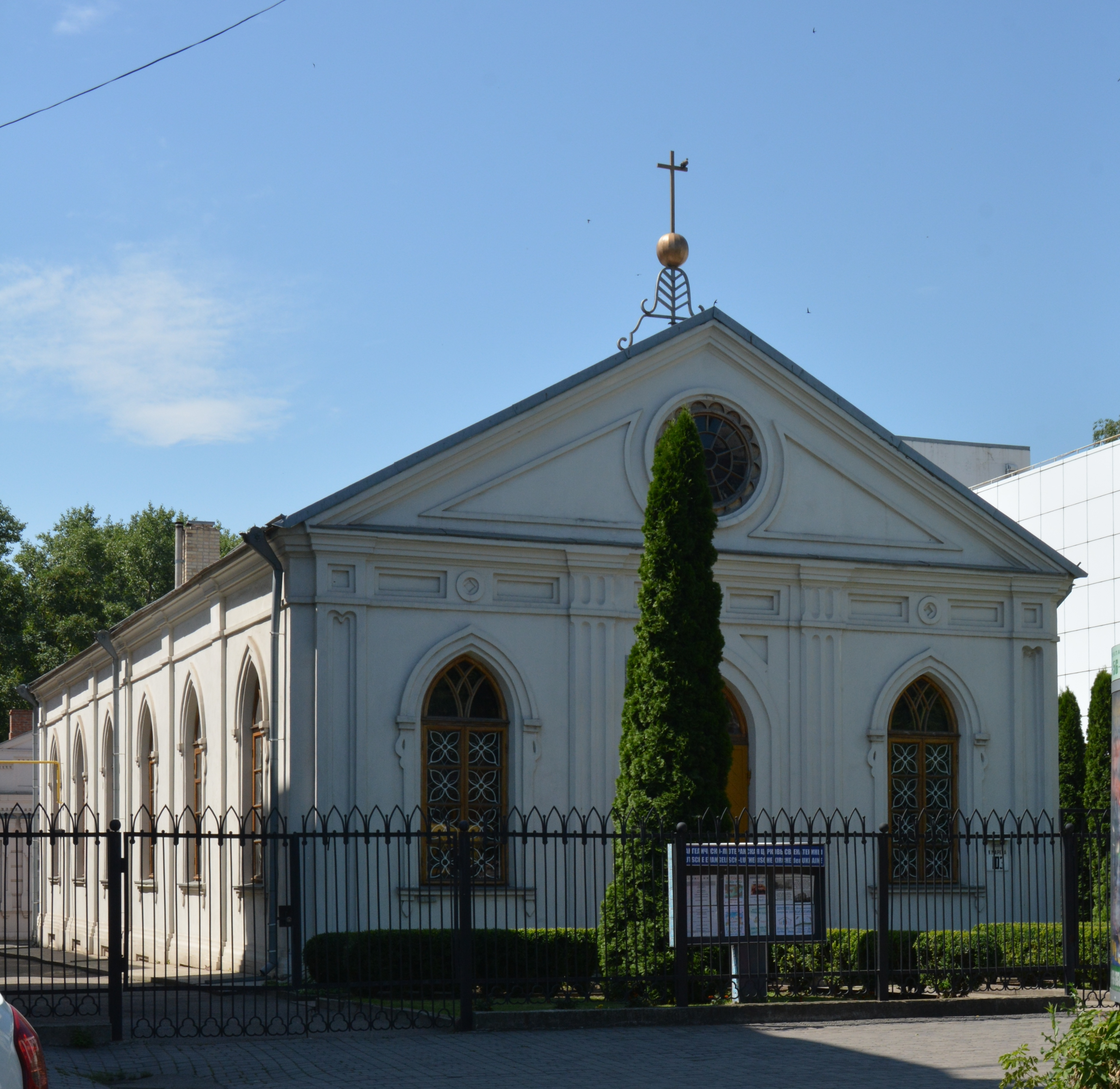 Лютеранська кірха, Дніпропетровськ, Карпа Маркса просп., 103